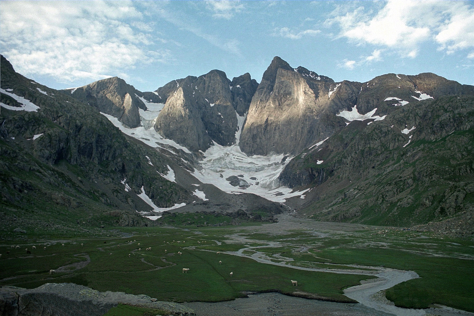 Beschreibung: Vignemale von dem Refuge des Oulettes de Gaube Quelle: Aufgenommen Ende Juli 2001 Fotograf: Sea-empress Lizenzstatus